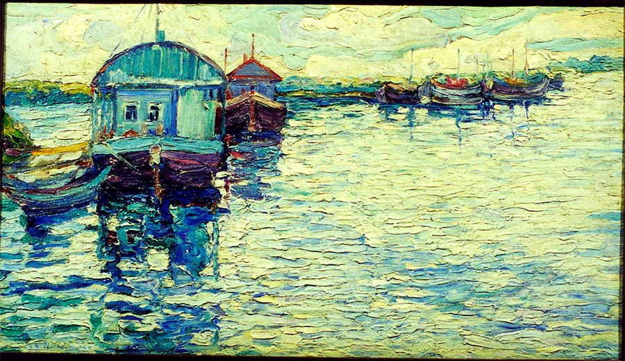 Маргарита Сергеевна Иноземцева (Жевакина-Никольская) - Пейзаж, 1916 Холст, масло. 37,5 х 65,3 Музей искусства Санкт-Петербурга ХХ-ХХI веков